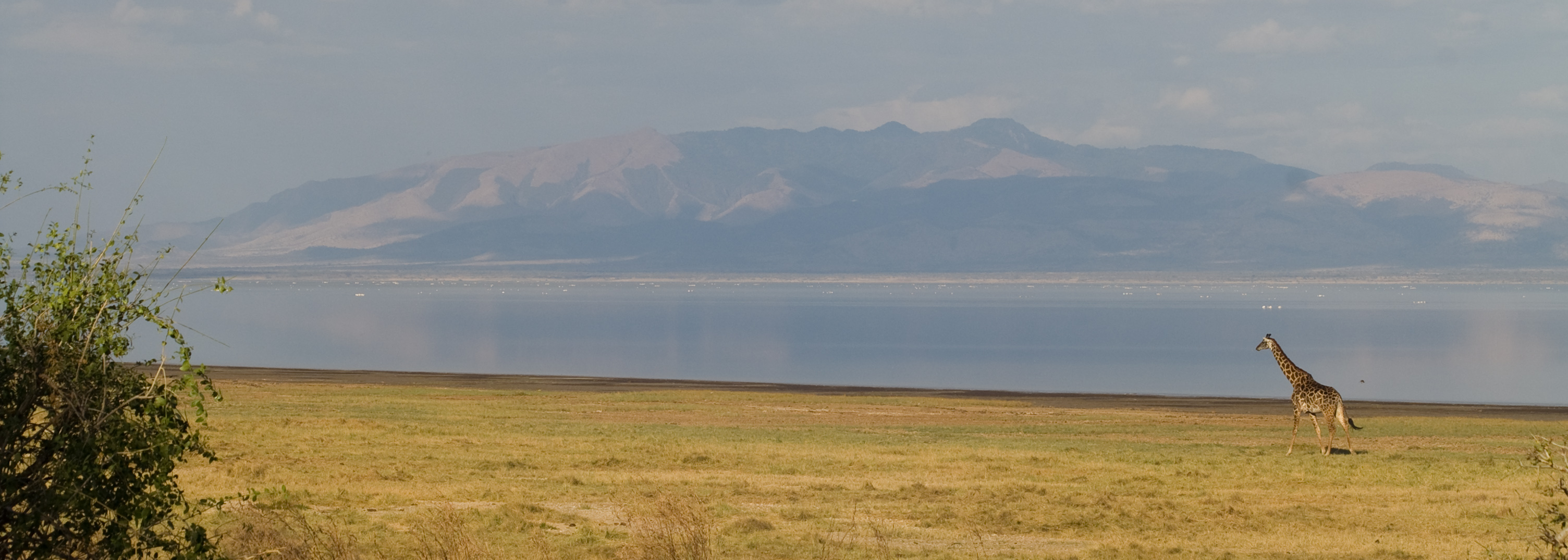 Giraffe, Lake Manyara national park, Tanzania.